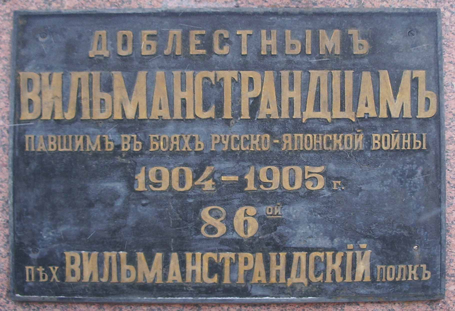 Табличка на памятнике «Орёл» в городе Старая Русса Новгородской области